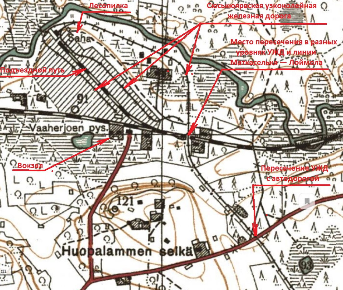 Ваахерйоки